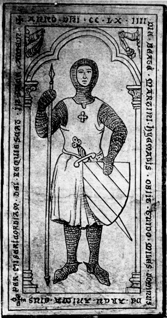 Tombe de Gui d Arc sur Tille (1264)